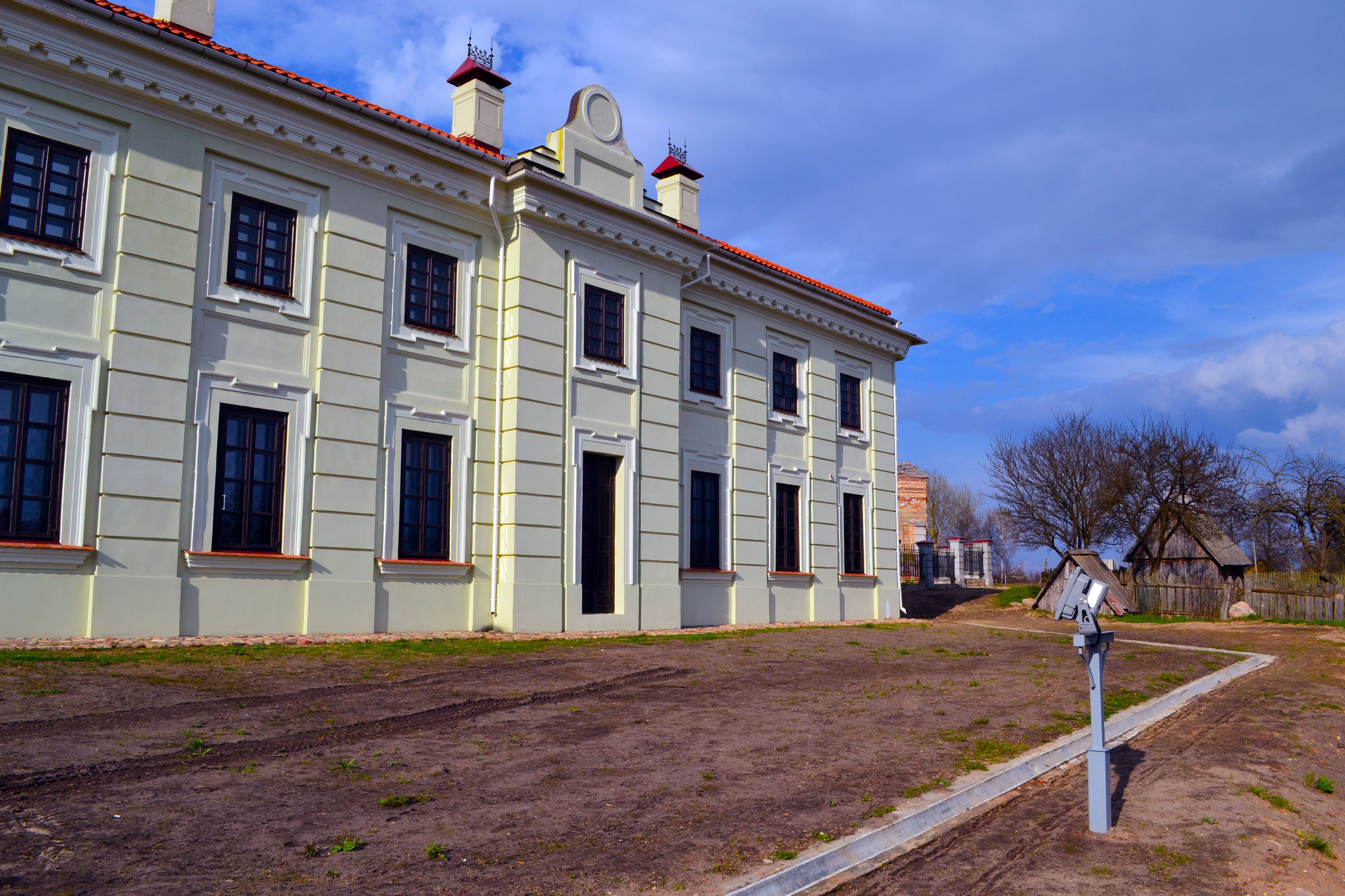 Беларуская (тарашкевіца): Рэшткі былога палацавага комплексу ў Ружанах (Берасьцейскай вобласьці): правае крыло галоўнага корпусу. This is a photo of Belarusian heritage monument. Reference number: 112Г000640 ( WLM)